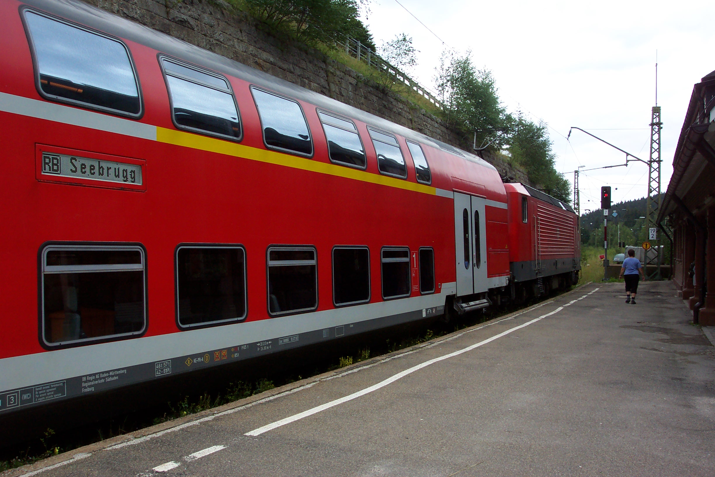 Doppelstockzug von DB Regio in Seebrugg, dem Endbahnhof der Dreiseenbahn.